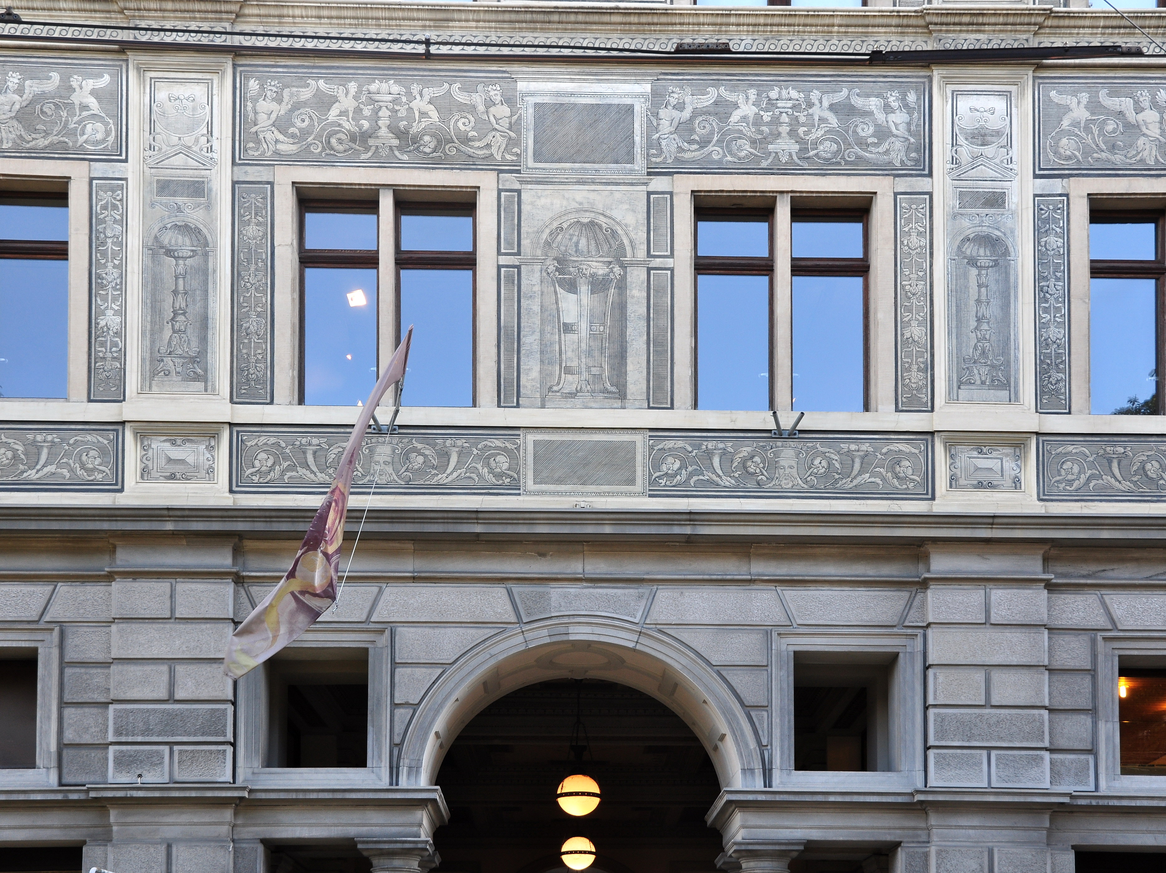 Rathaus, Marktgasse 20 in Winterthur (Switzerland)